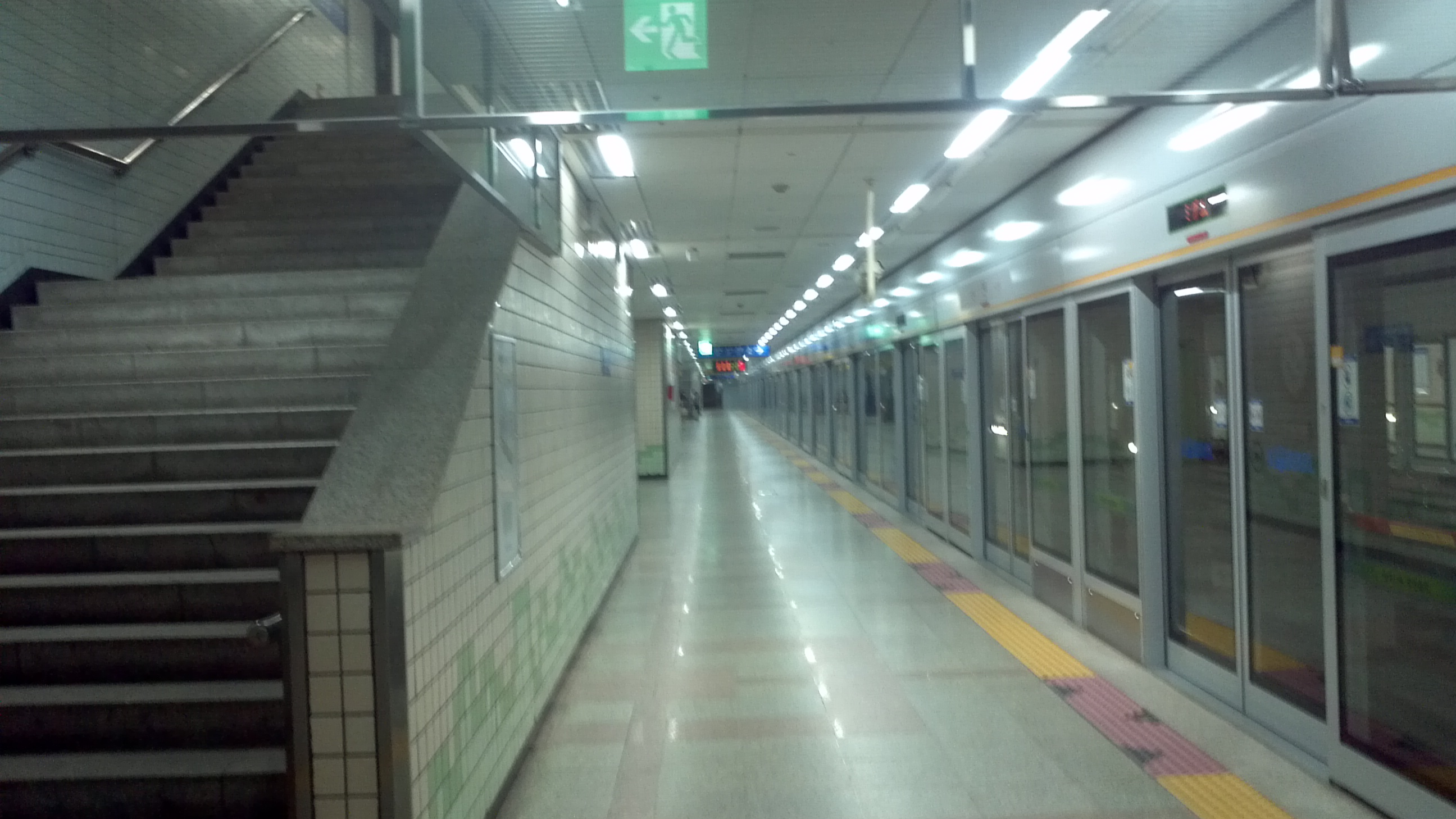 미금역 승강장